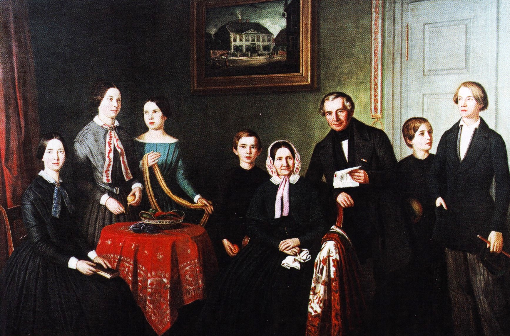 Familienbild Brökelmann von Engelbert Seibertz aus dem Jahr 1850